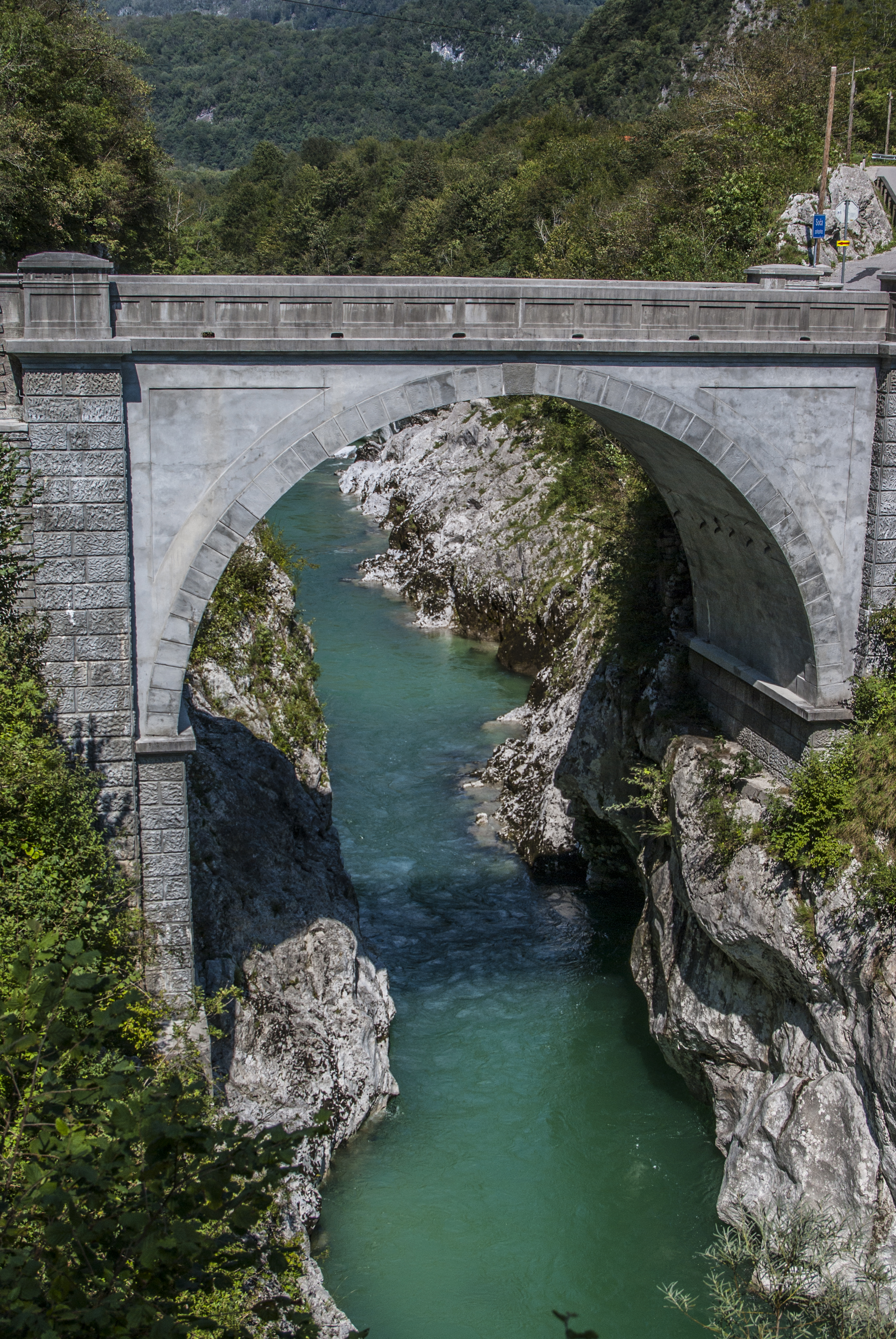 Caporetto-Kobarid